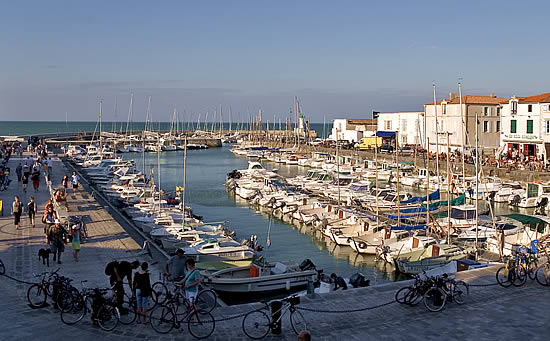 Port de La Flotte - île de Ré - Charente-Maritime Photo issue de ma banque d'images : Alain - Pep.per 16 septembre 2006 à 23:58 (CEST)